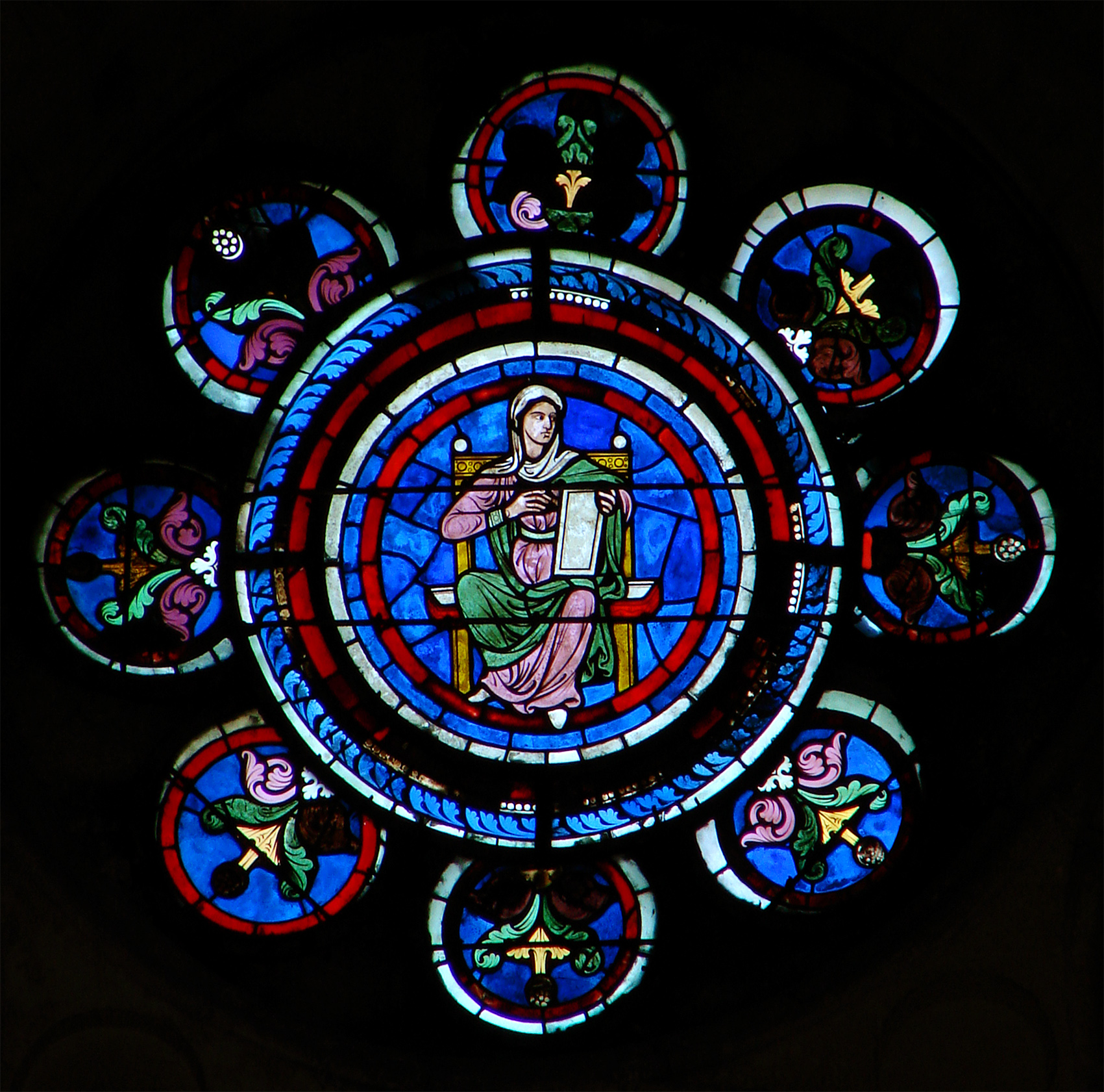 La Rhétorique, par Steinheil (1865), médaillon de la rose du transept Nord de la cathédrale Notre-Dame de Laon: la Rose des Arts libéraux. (Les médaillons représentent les 7 arts libéraux, auxquels ont été ajoutées la Médecine et la Philosophie (médaillon central). Le vitrail date de 1200 à 1210, mais quatre médaillons ont été réalisés par Adolphe Charles Edouard Steinheil en 1865 (la Philosophie, la Rhétorique, la Musique, la Médecine); il a repris les figures des voussures d'un portail de la façade, consacrées elles aussi aux Arts libéraux). (Source: le site du Ministère de la Culture)